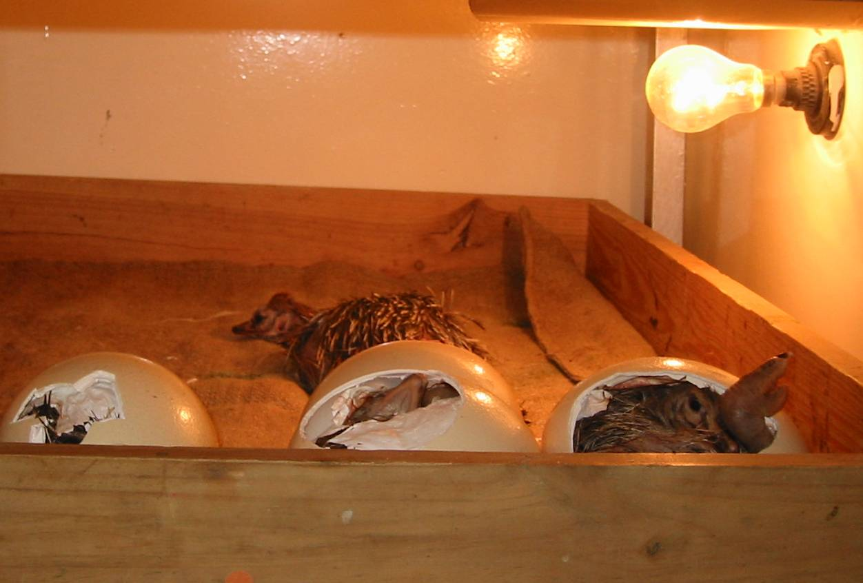 Schlüpfende Straußenküken / Hatching Ostrich fledglings Oudtshoorn (August 2003)